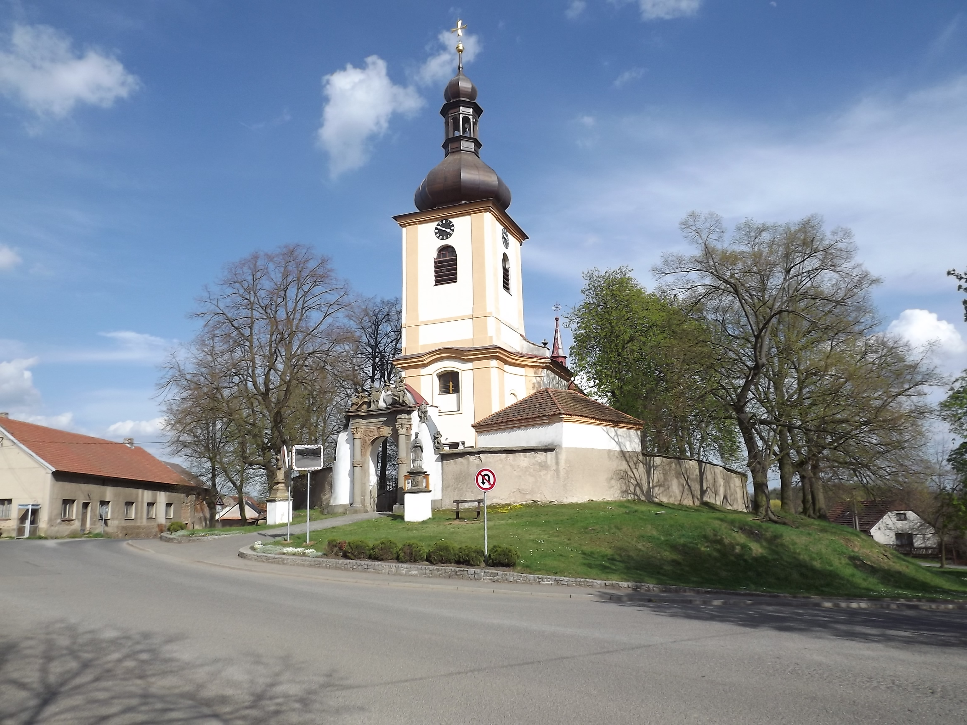 Kostel Nanebevzetí P. Marie (Pičín)